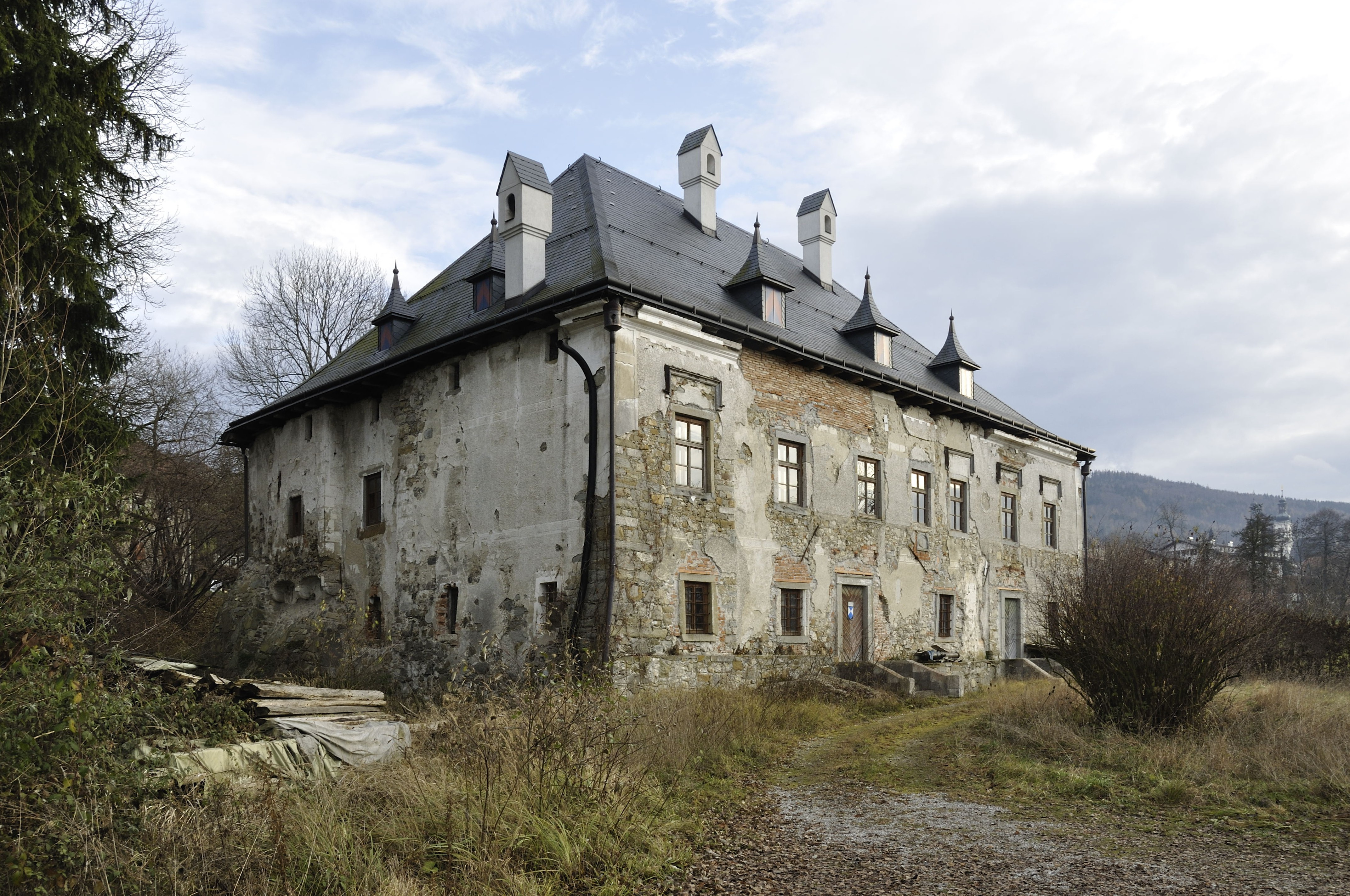 Schloss/Landgut Dorff